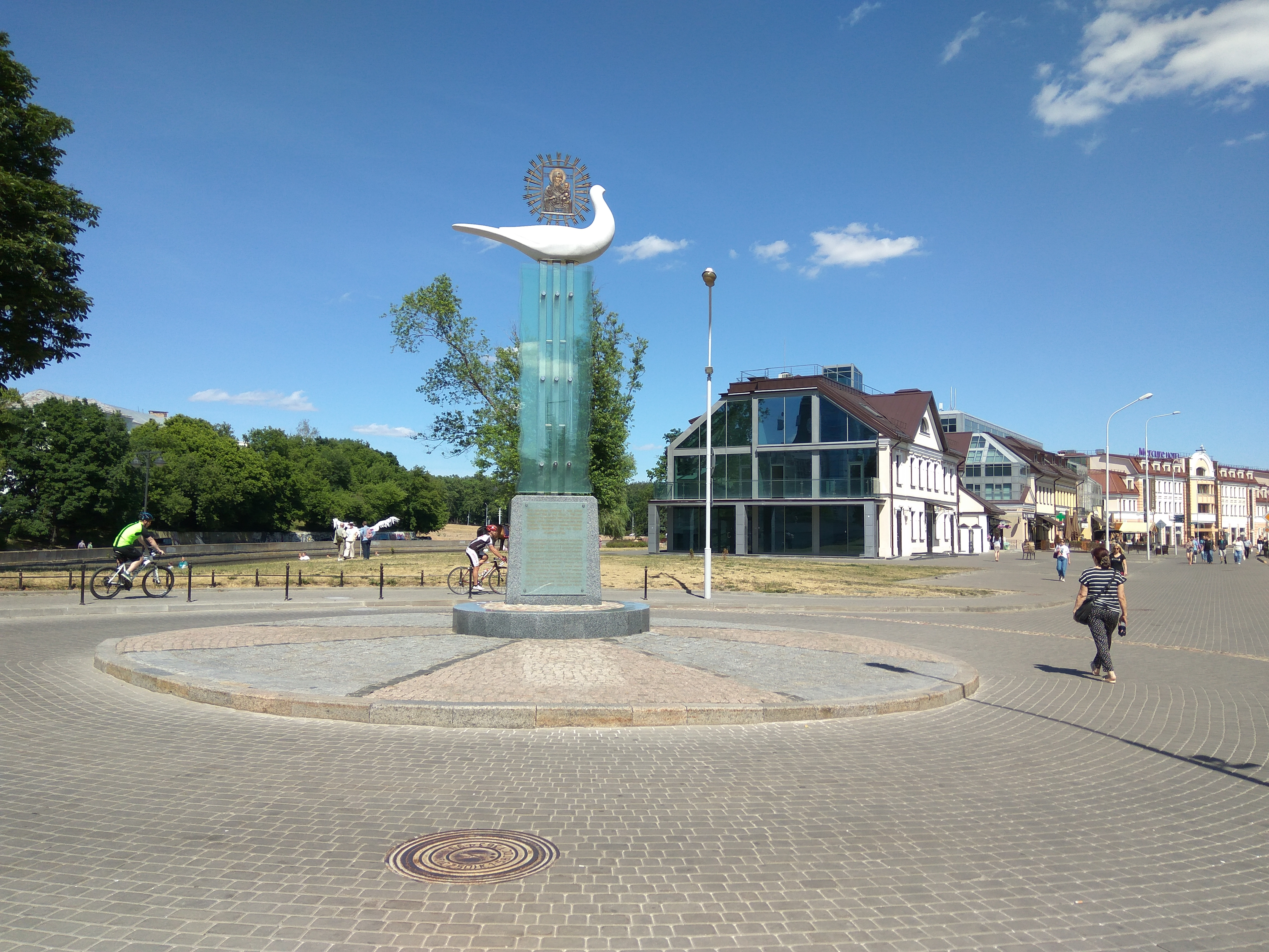 Мінск. Зыбіцкая вуліцы (2018)